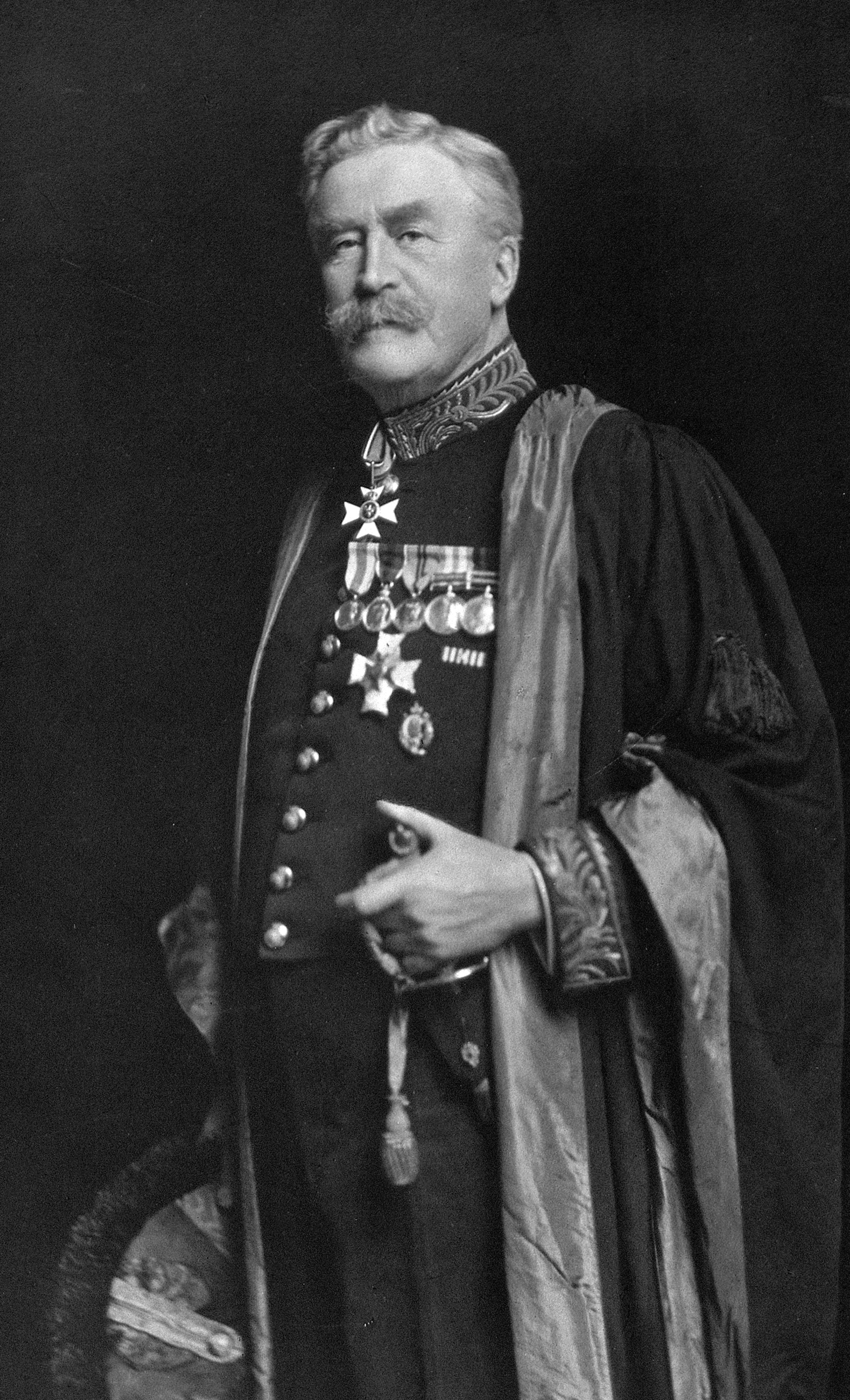 Alexander Ogston